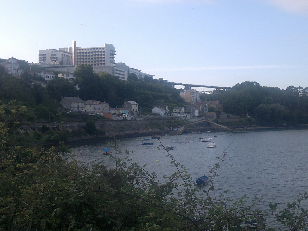 As Xubias (A Coruña).